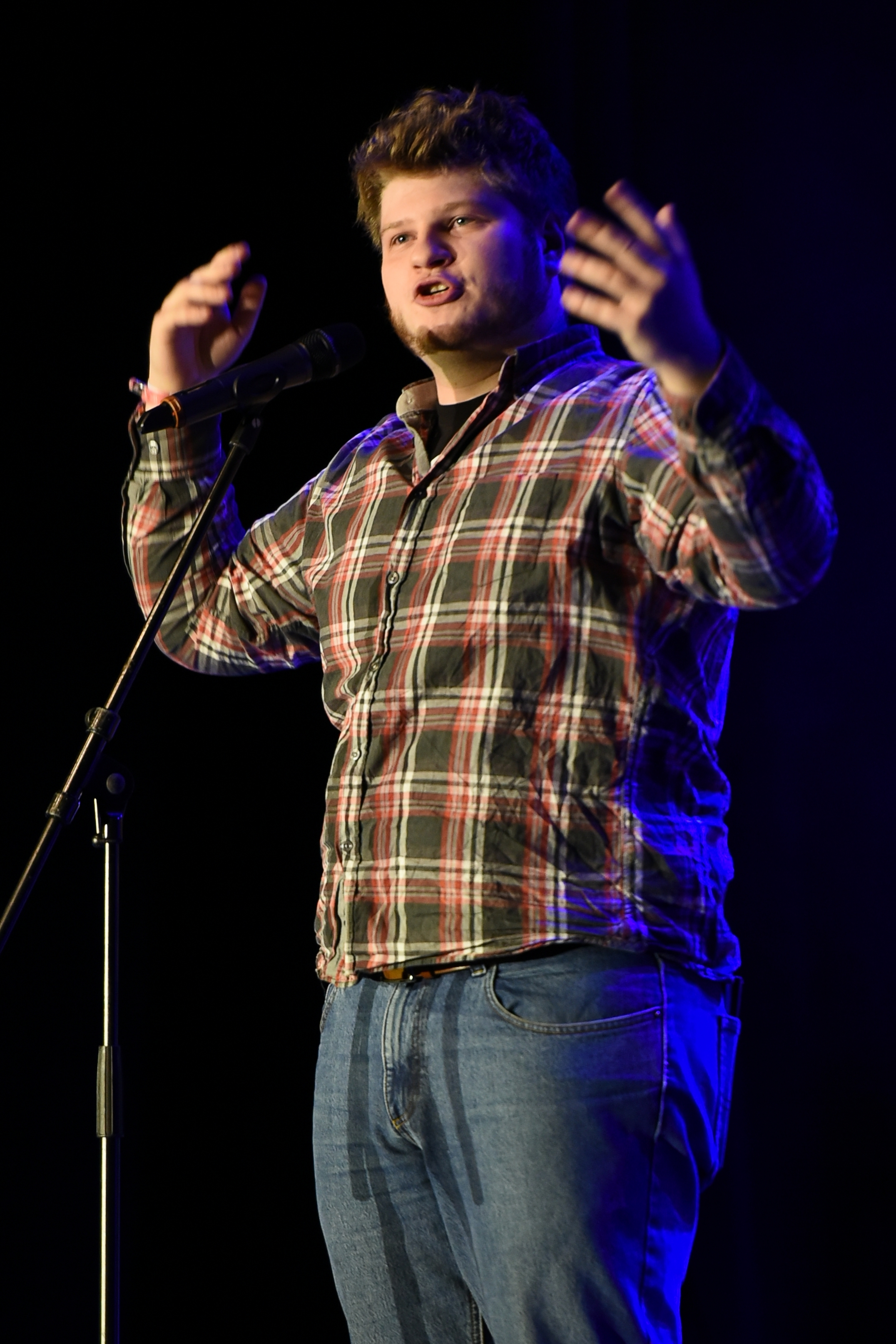 Jan Philipp Zymny bei Tegtmeiers Erben 2015 im Kulturzentrum Herne.